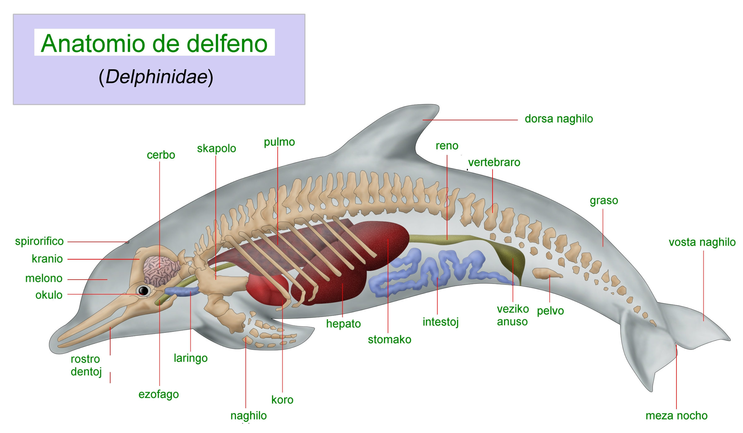 Esperanto-versio de "File:Dolphin anatomy.png", aŭtoro WikipedianProlific